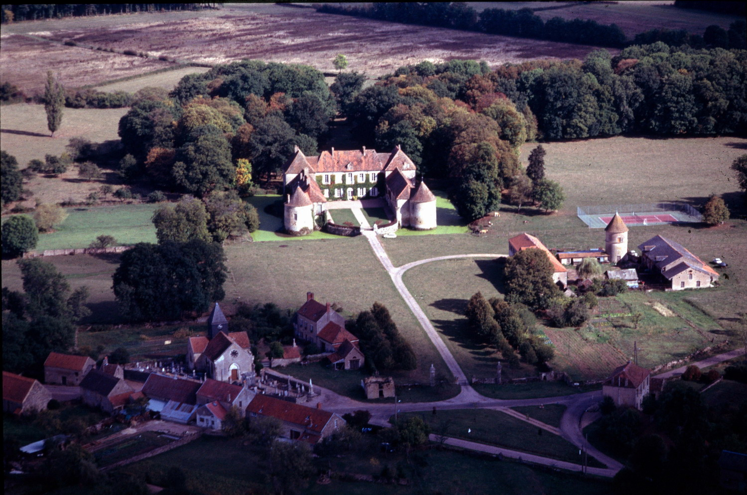 vue aerienne du village